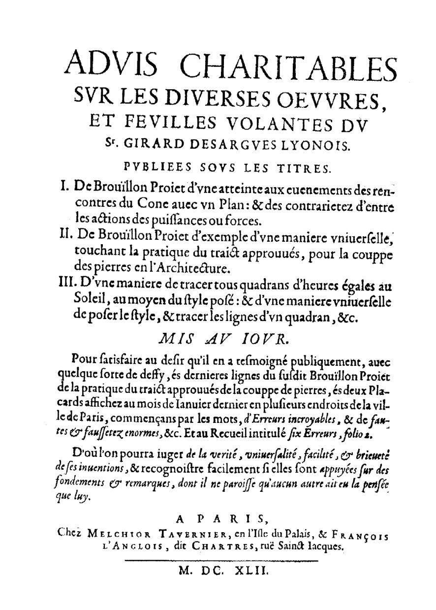 Aduis charitables sur les diuerses oeuures, et feuilles volantes du sr. Girard Desargues Lyoinois. Publies sus les titres. 1. De brouillon proiet d'vne atteinte aux euenements des rencontres du cone auec vn plane .... 2. De brouillon proiet d'exemple d'vne maniere vniuerselle .... 3. D'vne maniere de tracer tous quadrans d'heures égales au soleil .... Mis au iour. Pour satisfaire au desir qu'il en a tesmoigne publiquement ... D'ou l'on pourra iuger de la verité .... - A Paris : chez Melchior Tavernier, en l'Isle du Palais, & François L'Anglois, dit Chartres, rue Sainct Jacques, 1642. - [2], 14, [2] p. ; 4º .